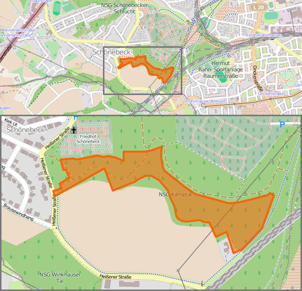 Naturschutzgebiet Kamptal (E-006) – Karte